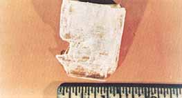 Кристалл калия-натрия тартрата тетрагидрата, выращенный на орбитальной станции "Скайлэб".